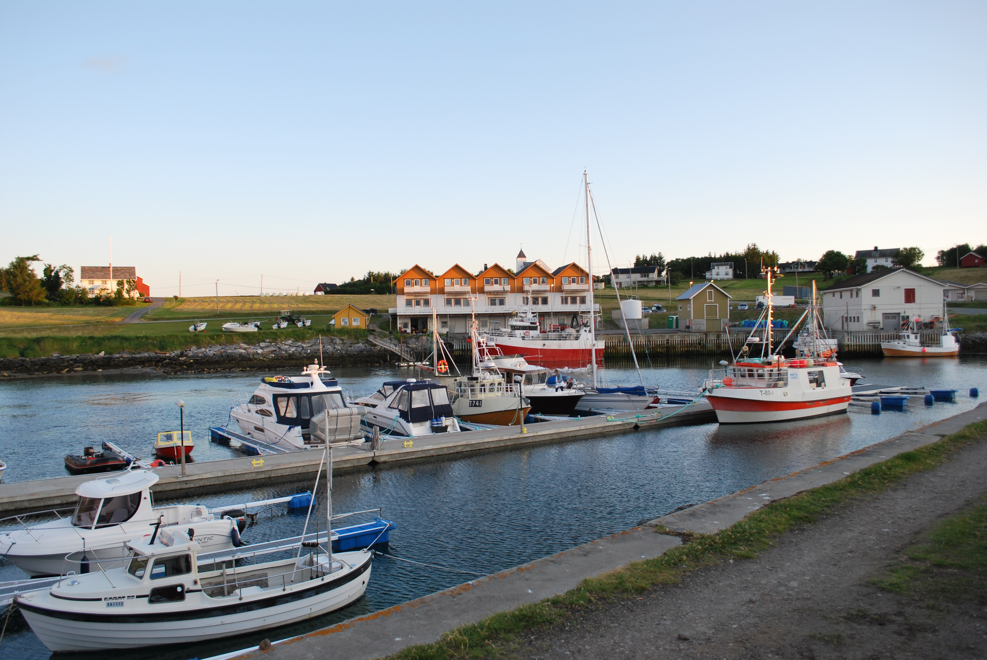 Engenes, Andørja, Ibestad kommune, med båthavna